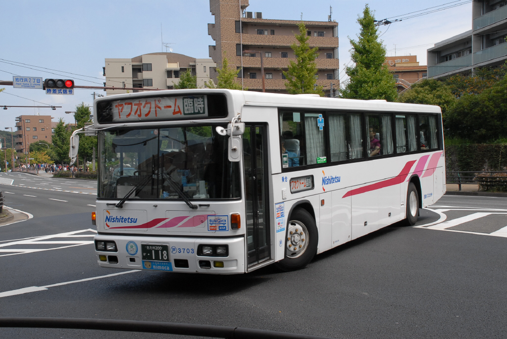 ドーム前交差点にて、2014-9-15撮影